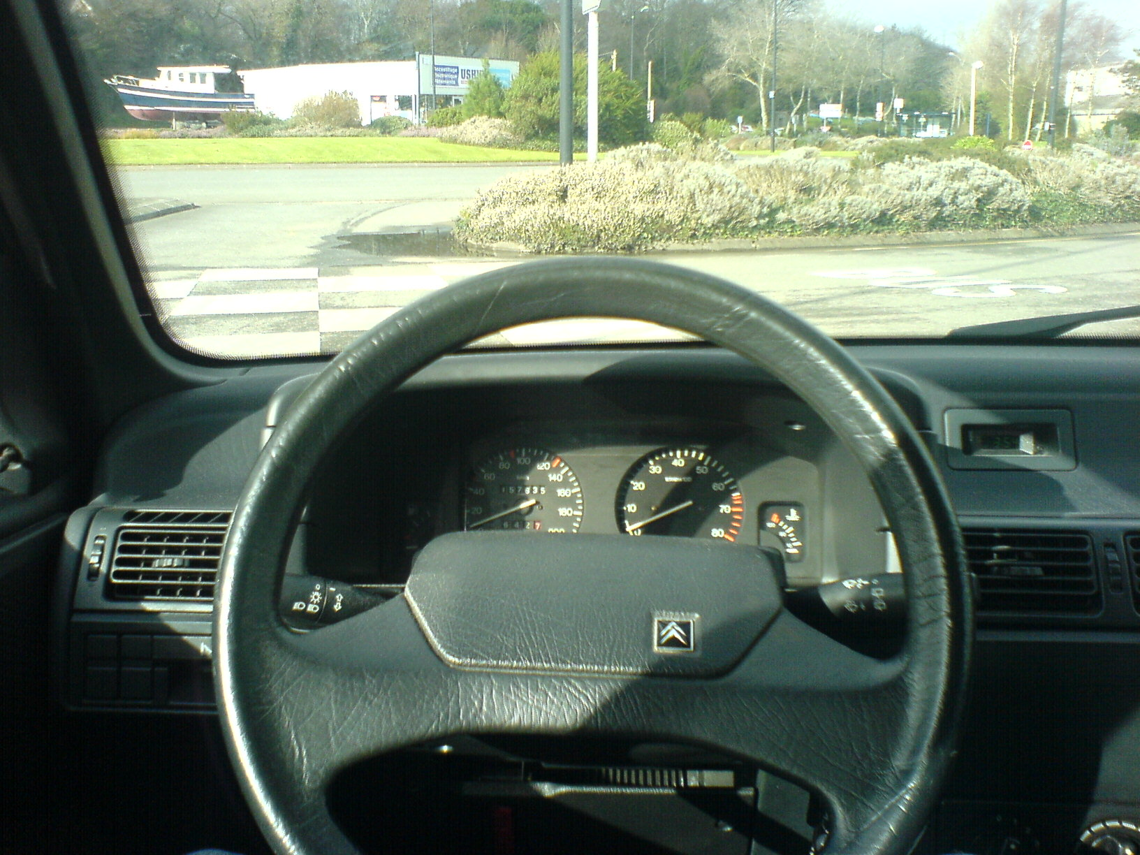 Citroen ZX cockpit